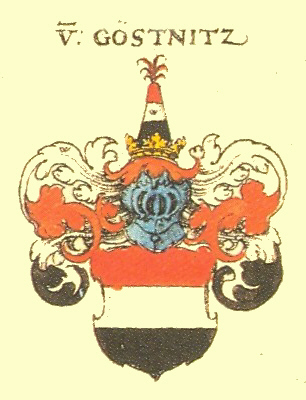 Wappen der Sächsischen und Meißner Adelsfamilie Gößnitz